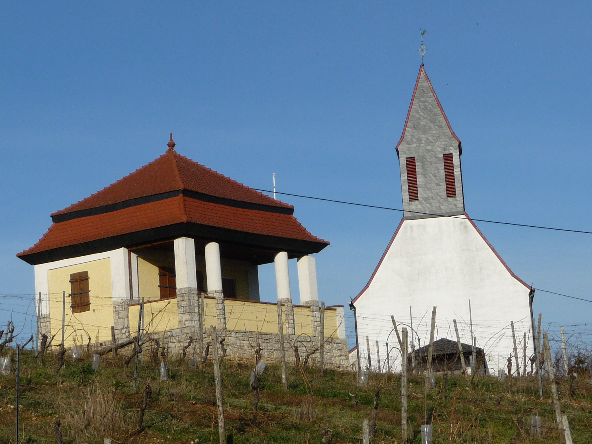 Mölsheim in Rheinland-Pfalz